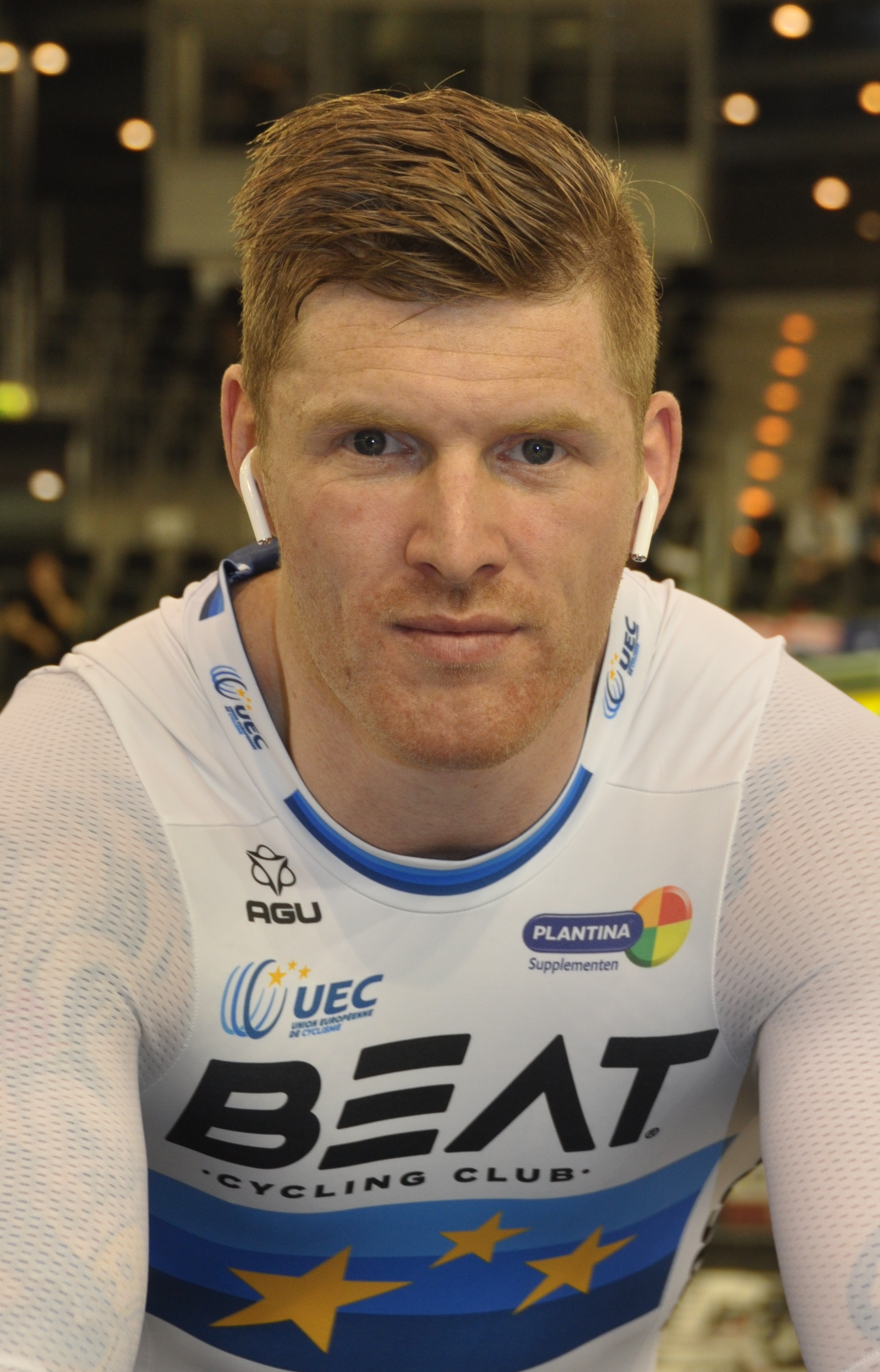 Roy van den Berg, niederländischer Radsportler